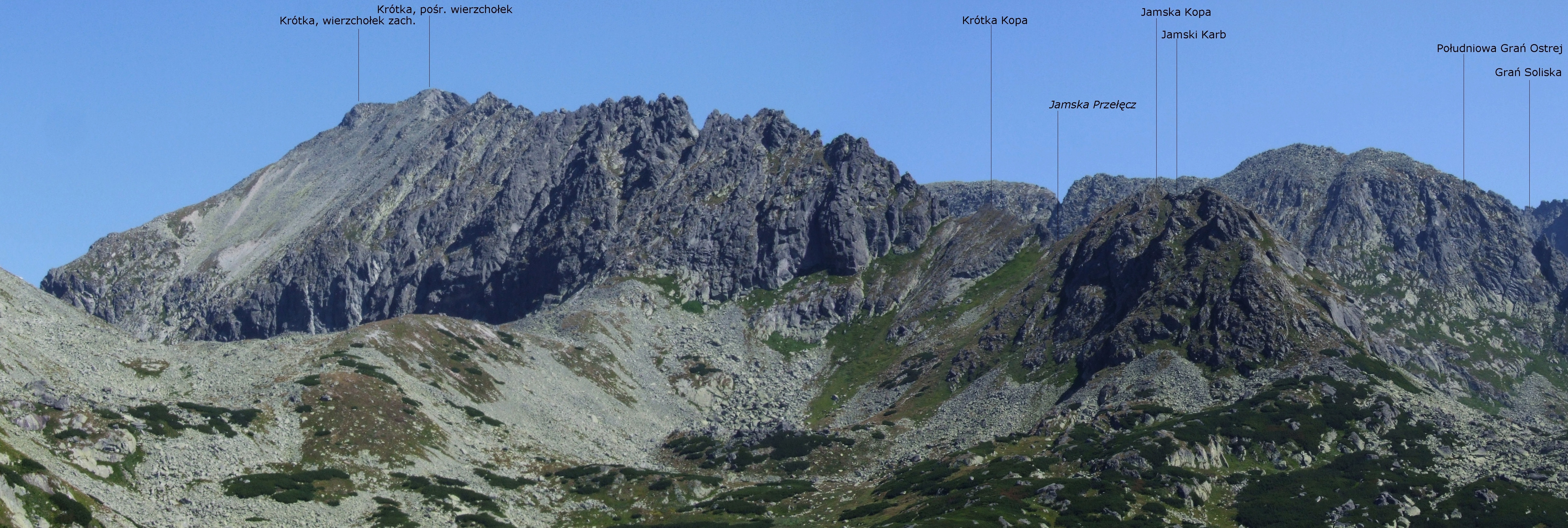 Widok z Pawłowego Grzbietu na Jamską Grań, Południową Grań Ostrej i Grań Soliska